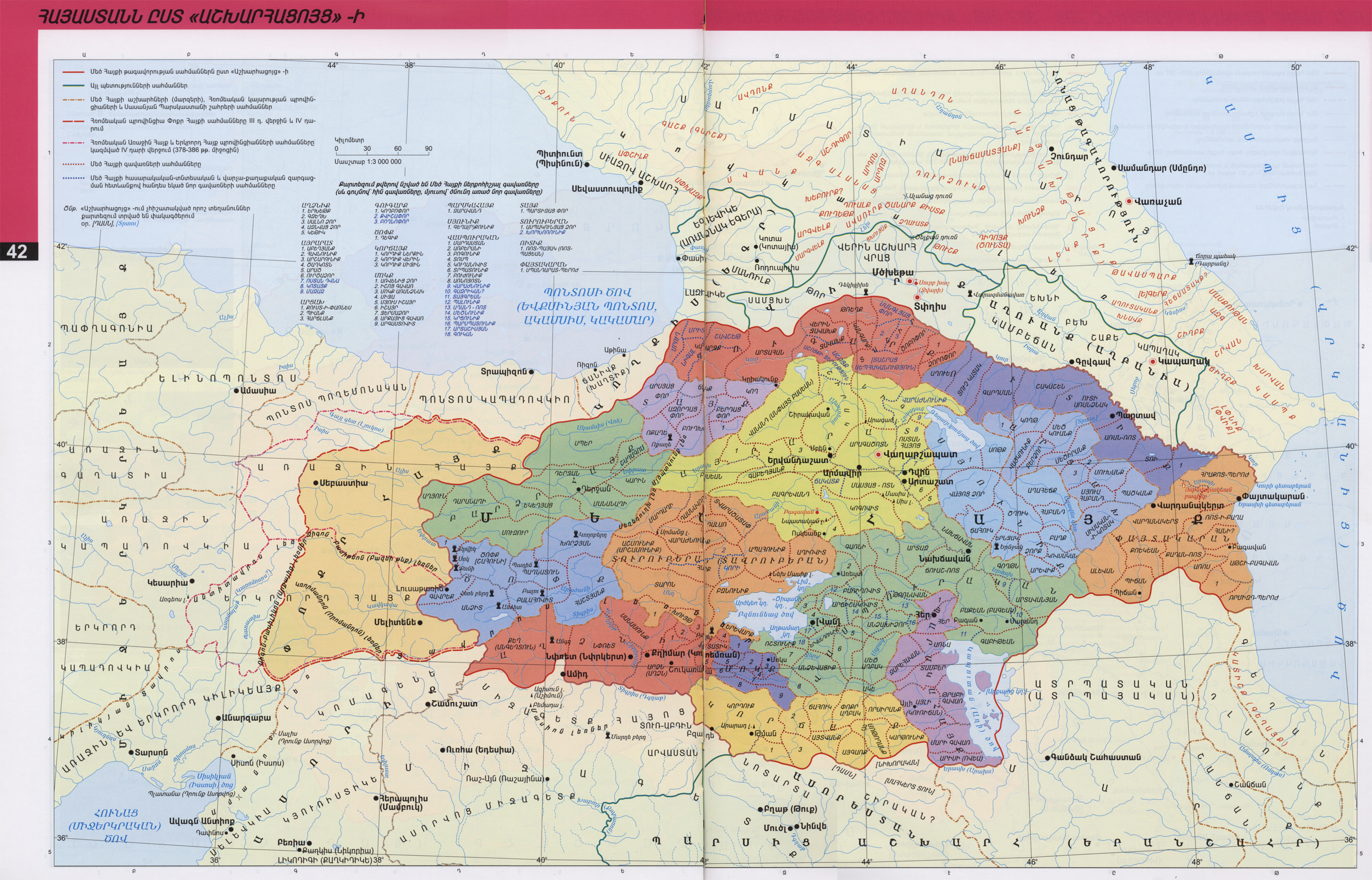 Հայաստանն ըստ Աշխարհացույցի